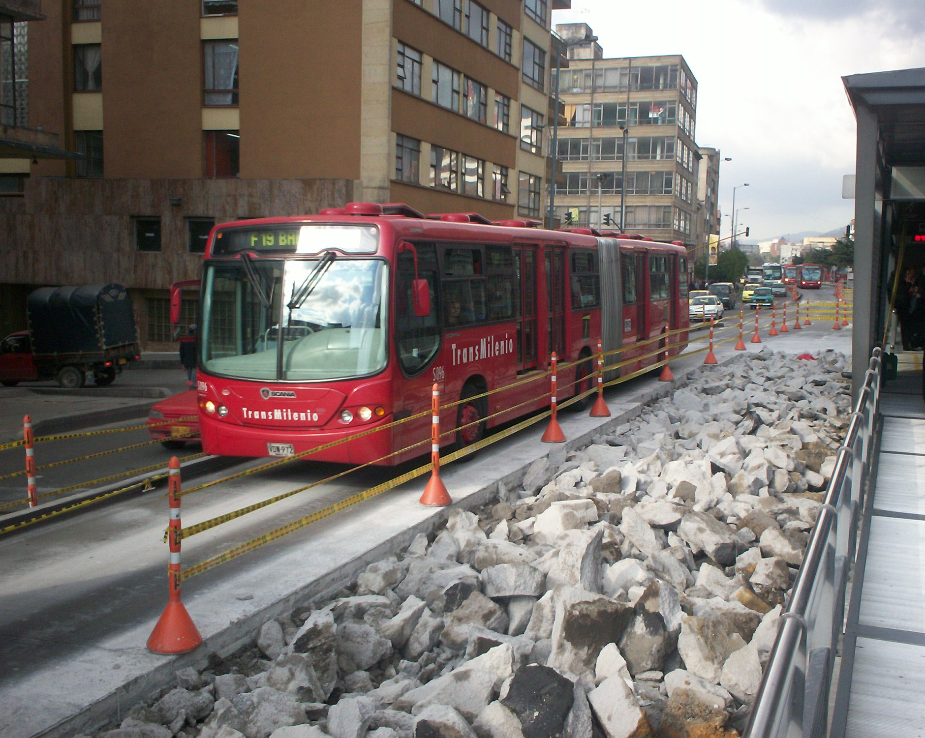 Arreglo en las losas de la Calle 19